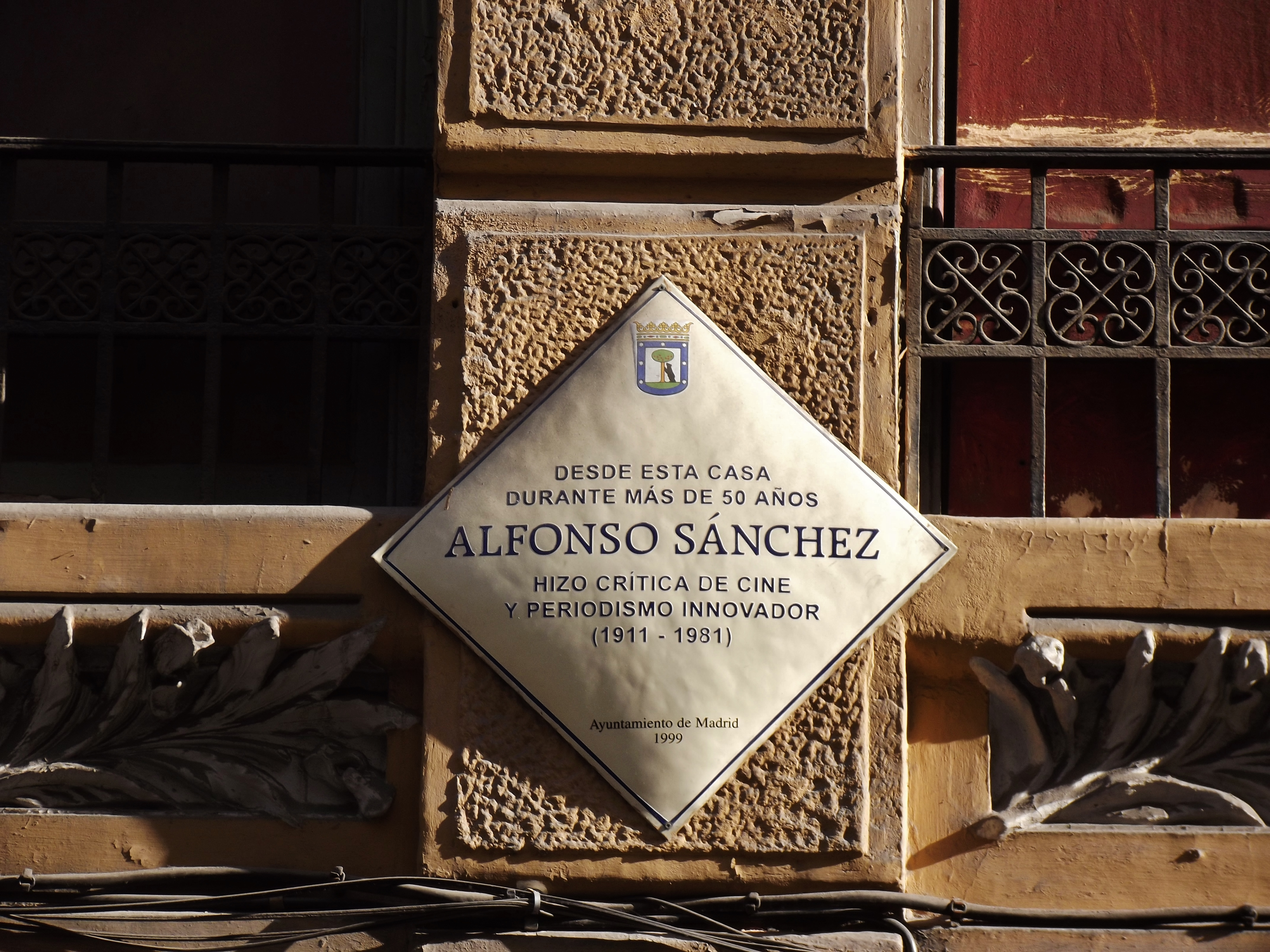 Aquí trabajó Alfonso Sánchez, Madrid.